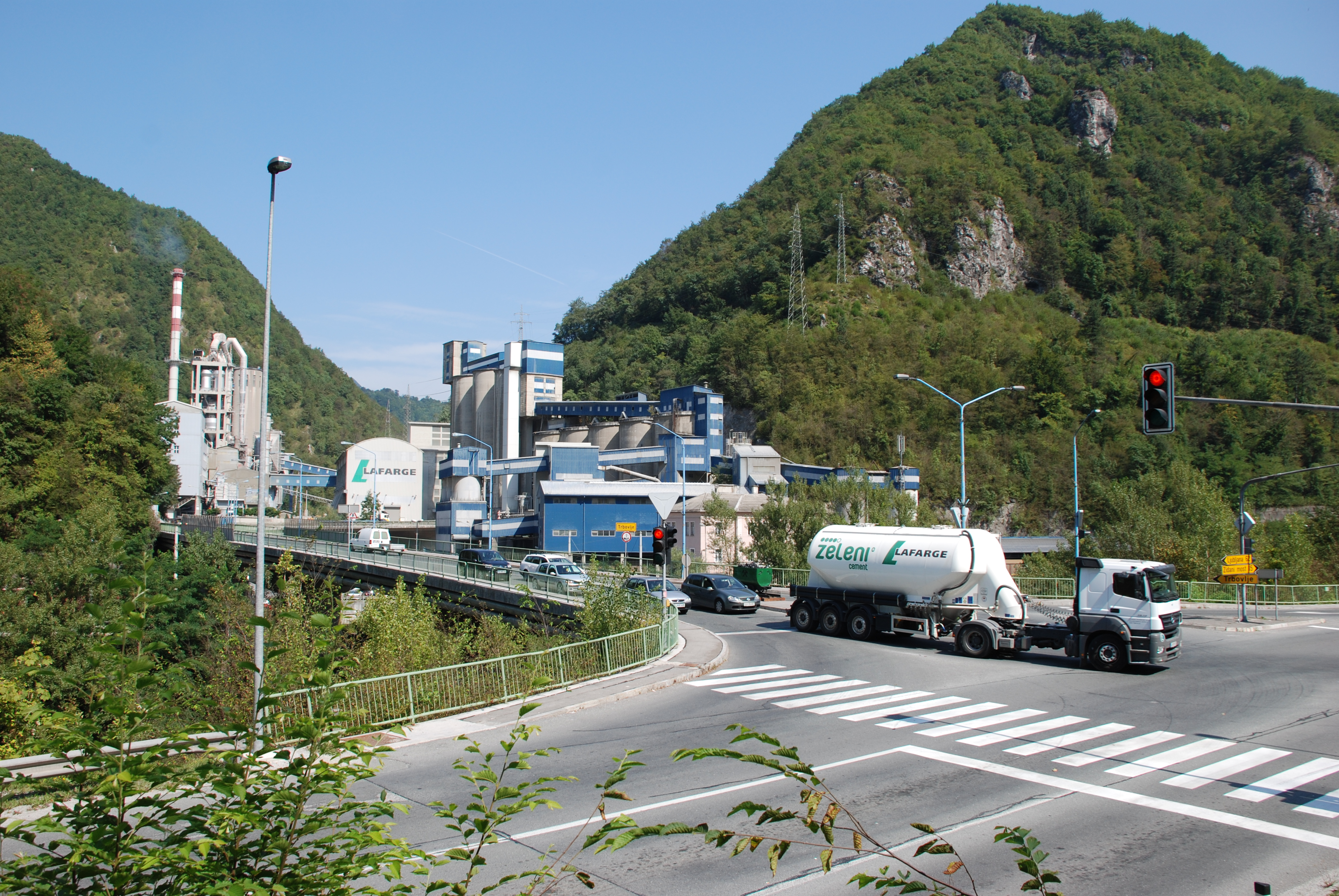 Pogled na trboveljsko cementarno z mostu čez reko Savo ob vstopu v Trbovlje.